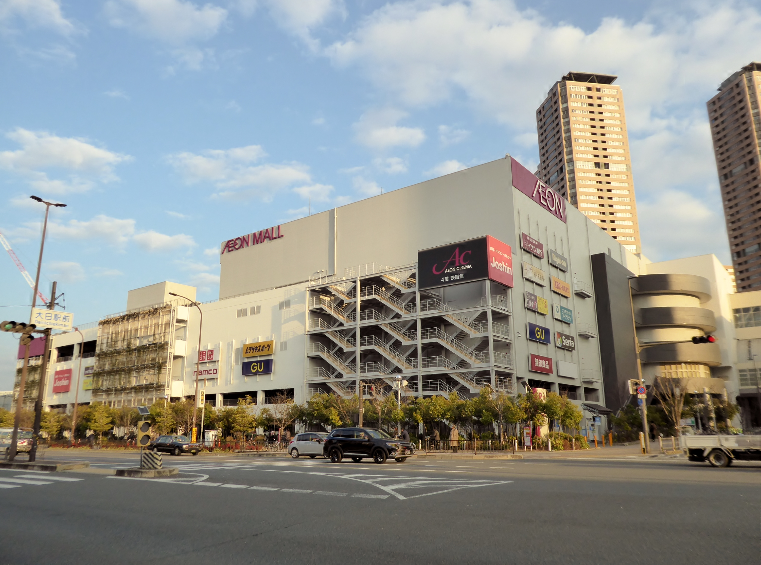 イオンモール大日イースト棟を撮影。